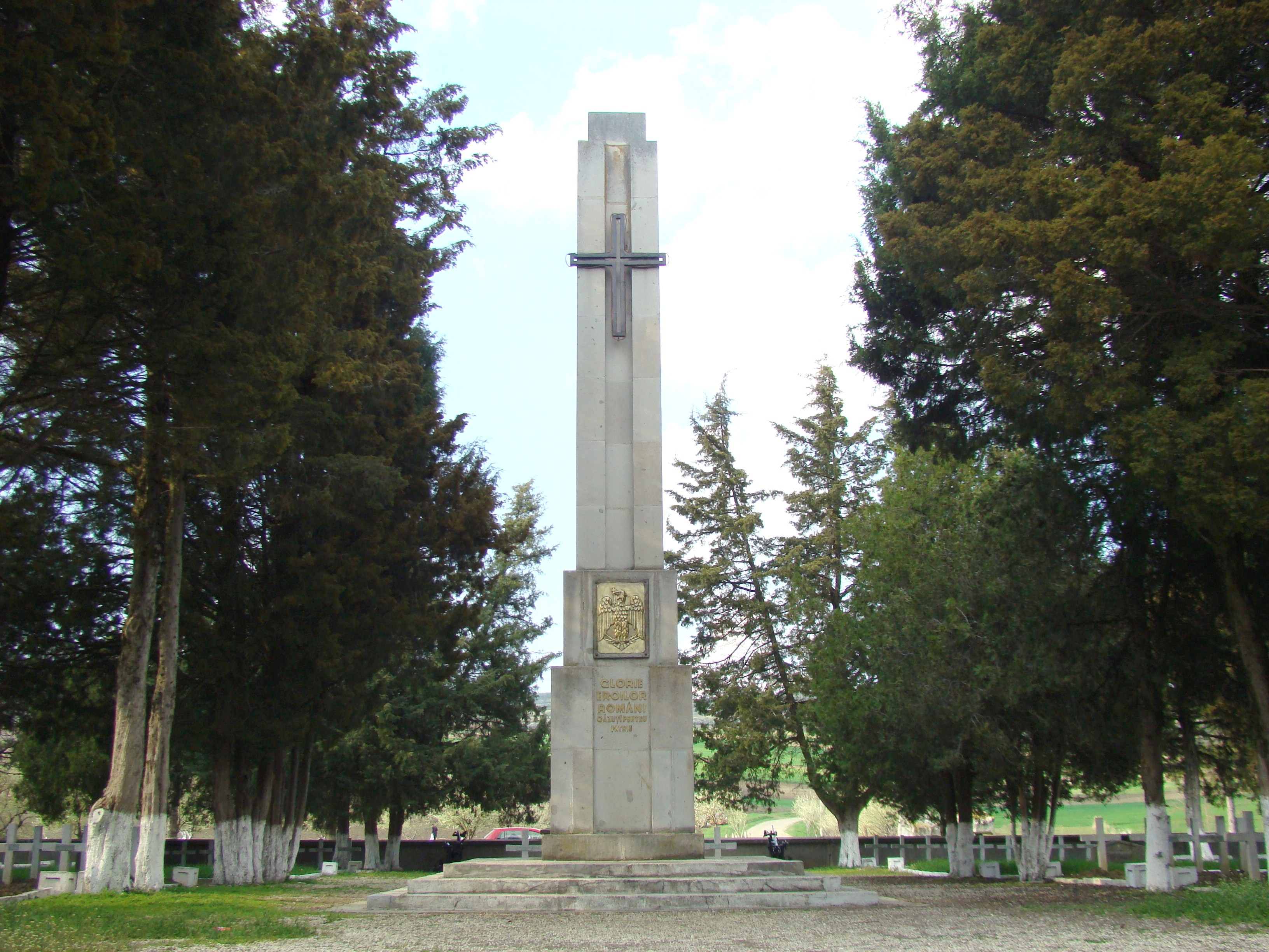 Monumentul eroilor români căzuţi în cel de-al doilea război mondial, sat OARBA DE MUREŞ; oraş IERNUT